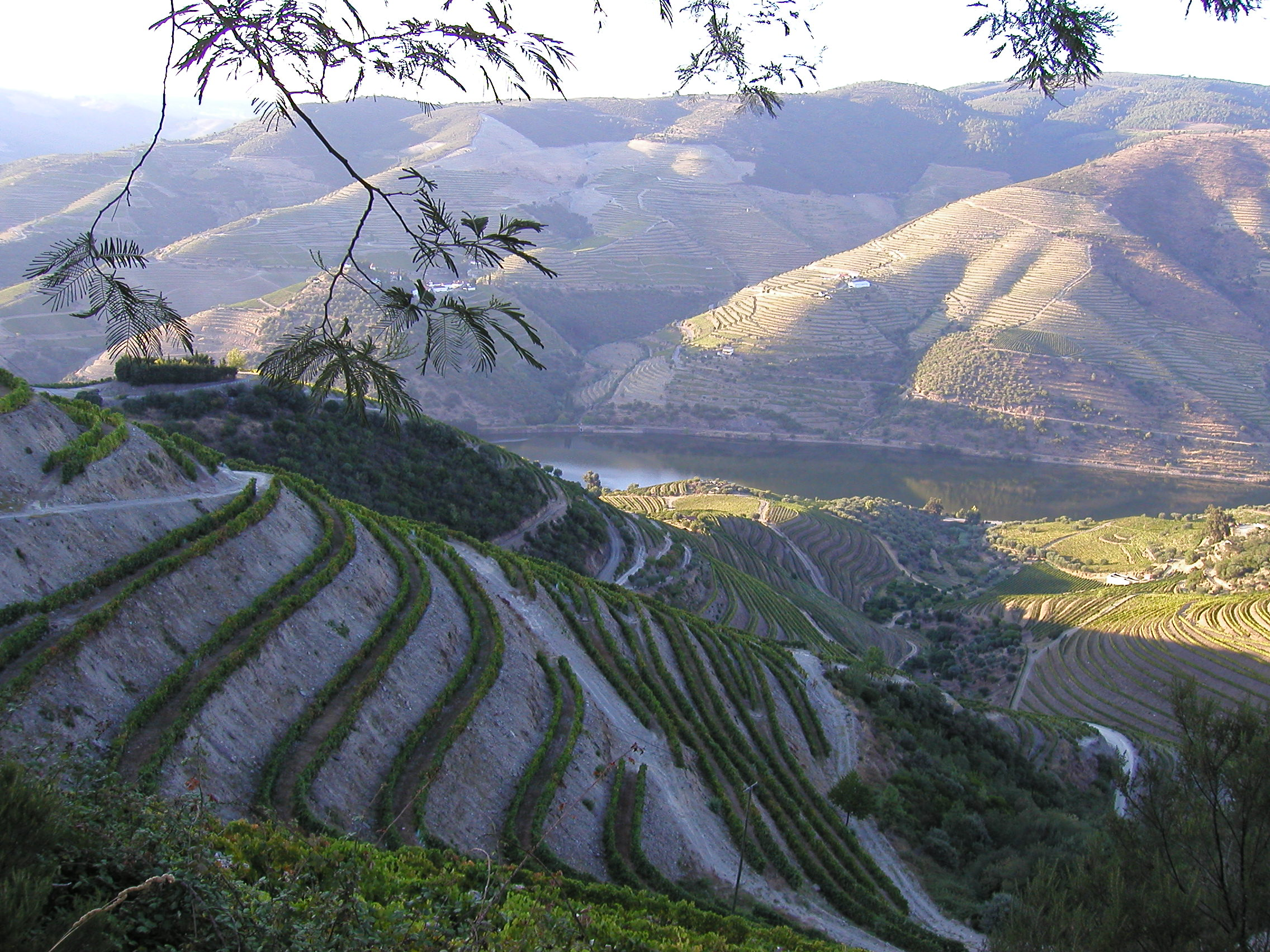 Dourovallei